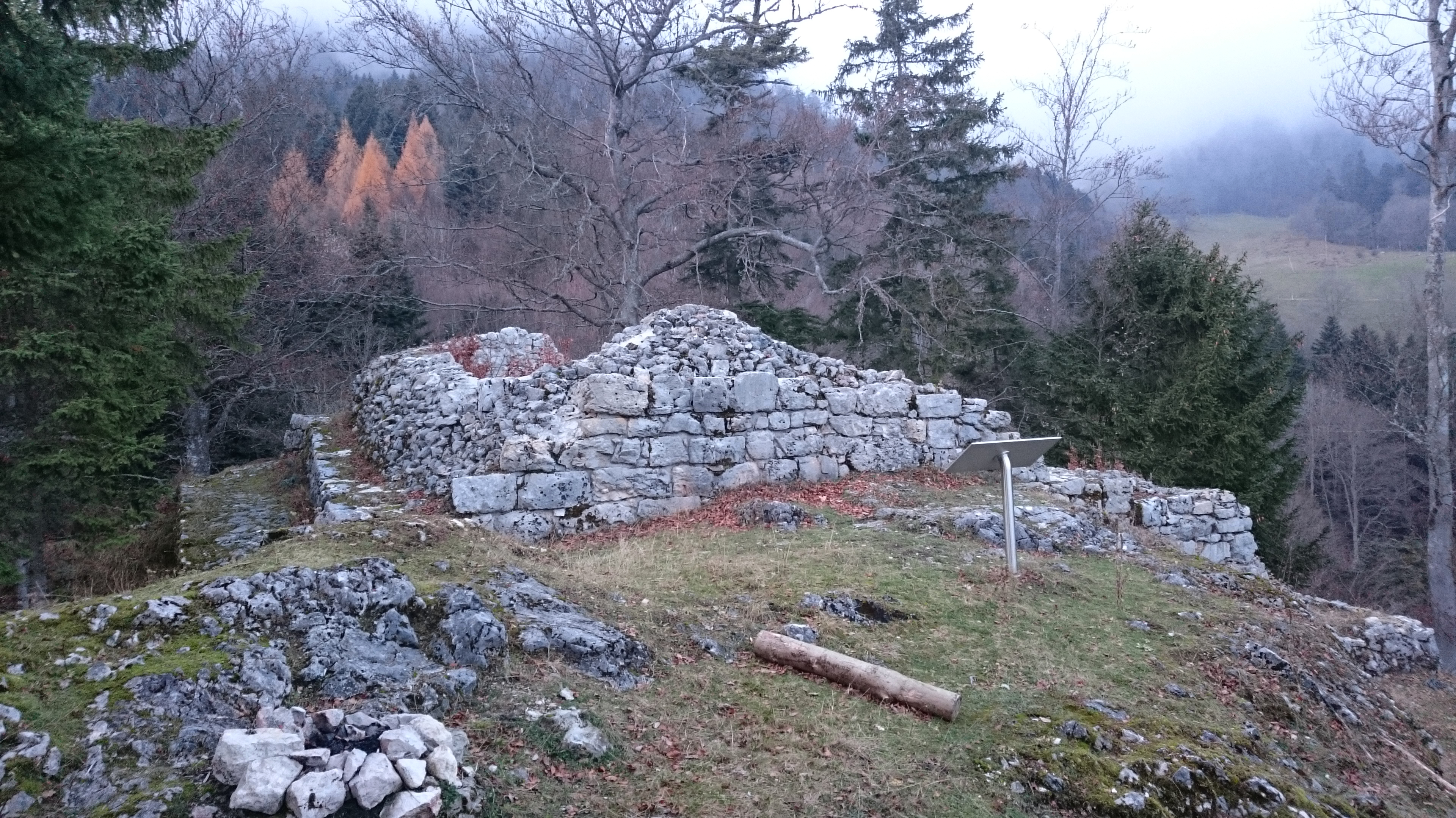 Ruine der Burg Grenchen aus dem 12. Jahrhundert.